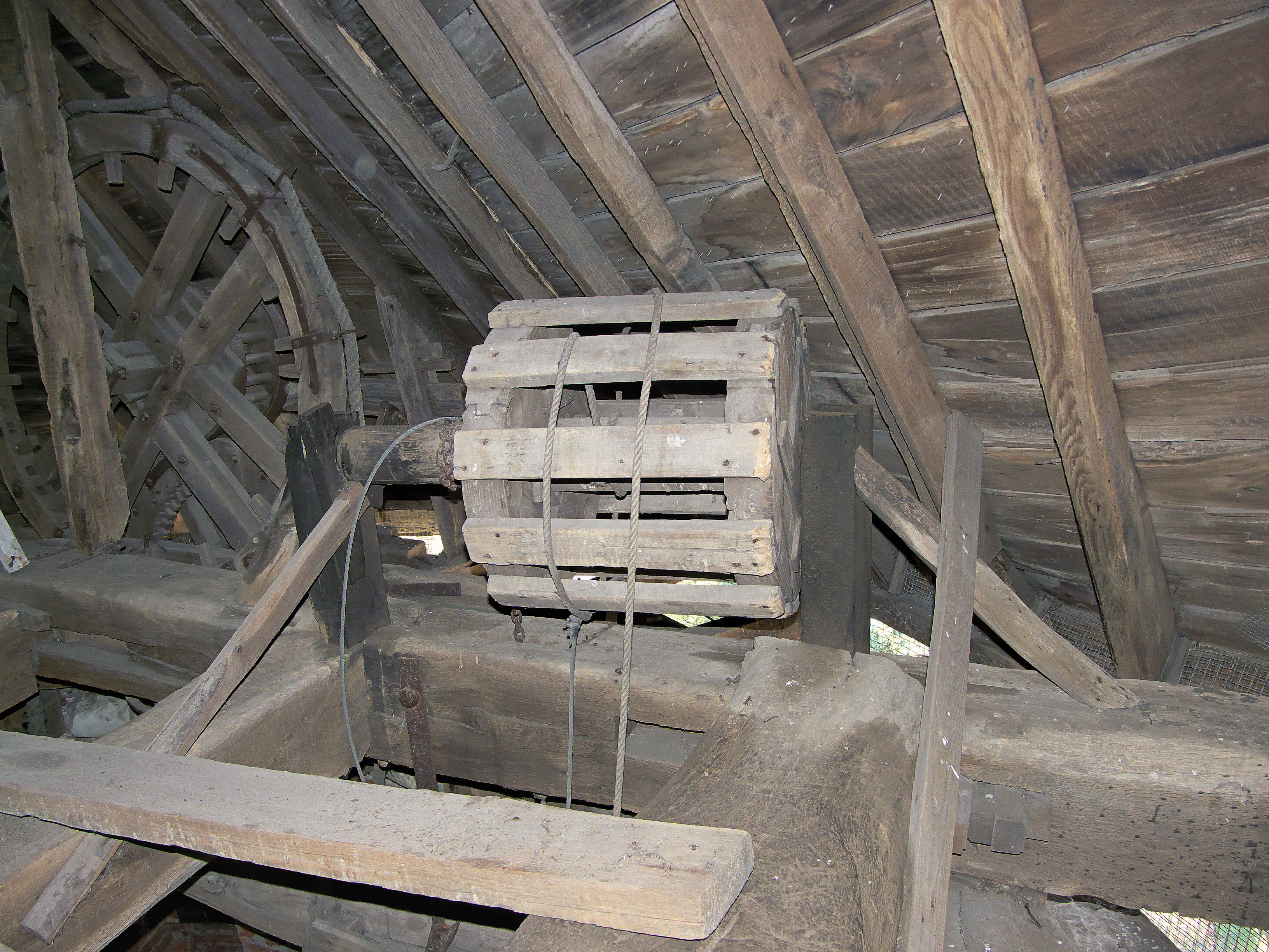 Molen Turmwindmühle Werth, Duitsland: vangtrommel gemaakt van een oude schijfloop.